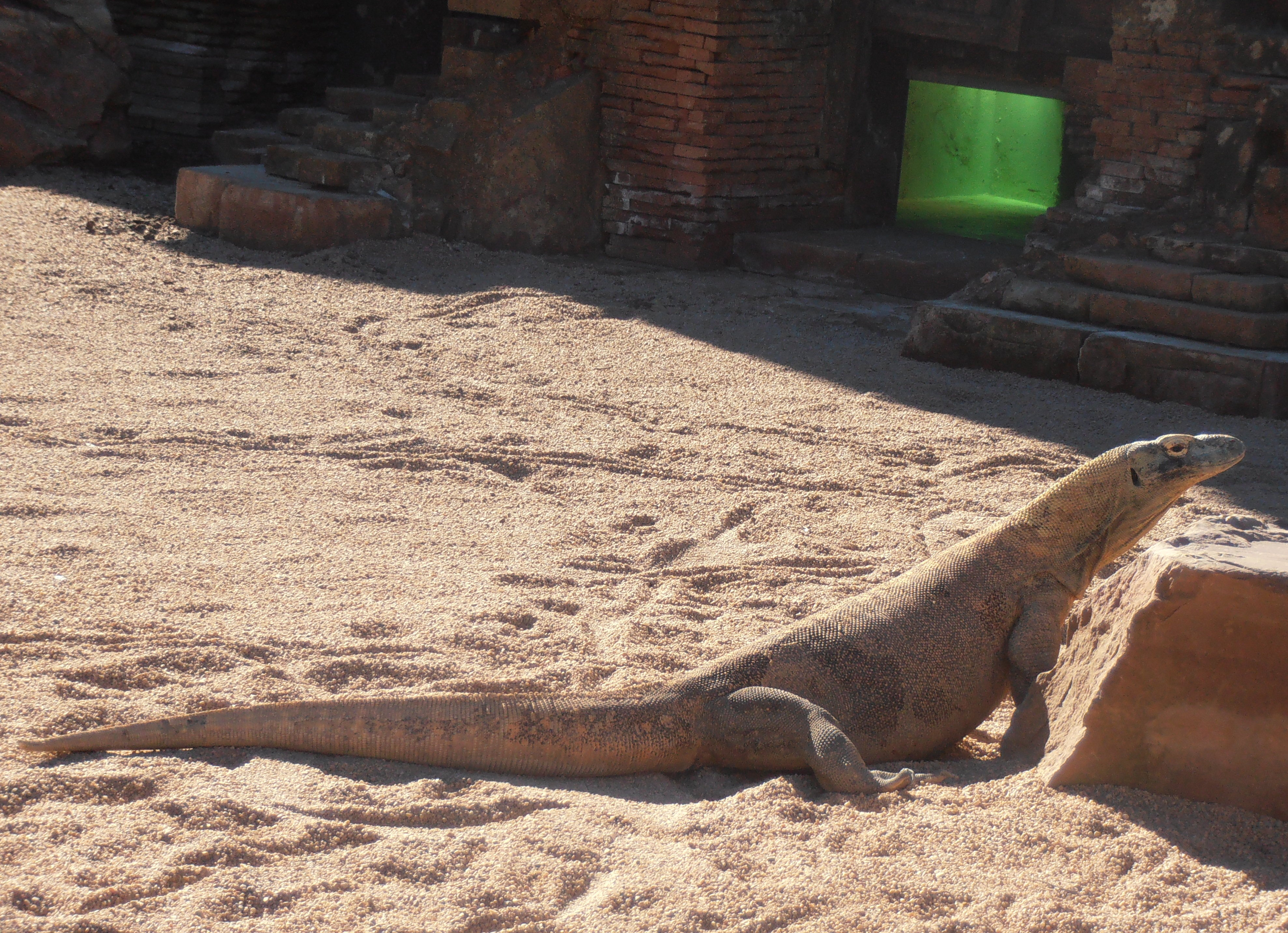 Varano di Komodo (Bioparc di Fuengirola)